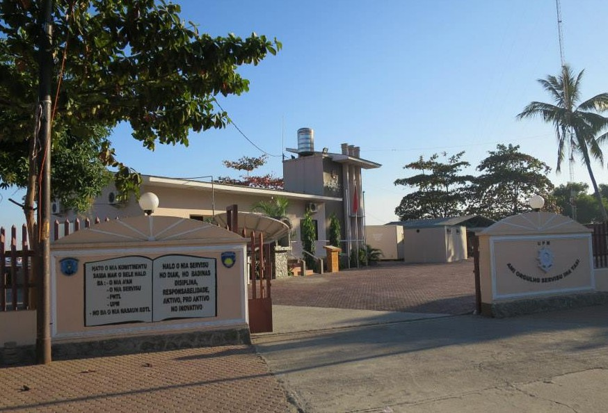 Dili, East Timor